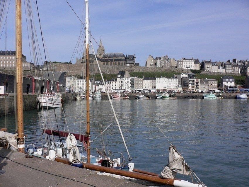 Granville, le port et Notre Dame